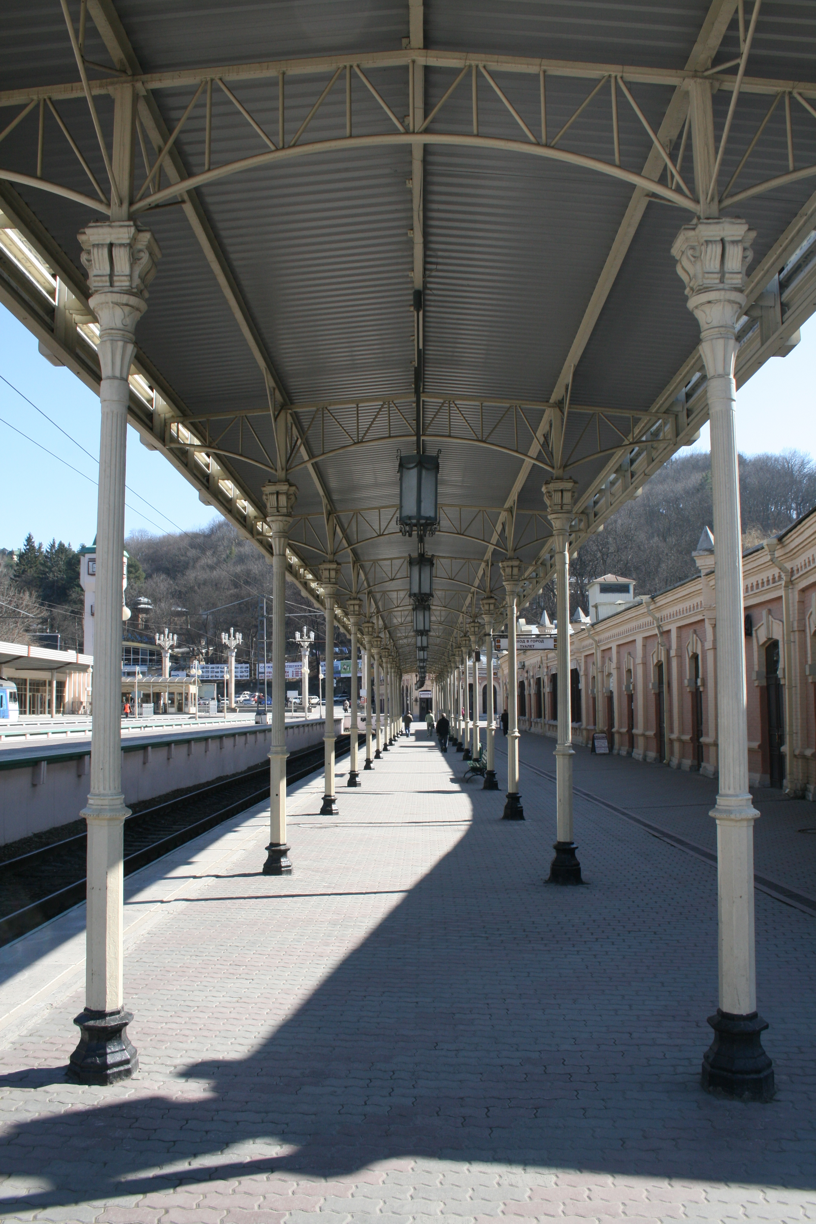 Здание железнодорожного вокзала (Ставропольский край, Кисловодск, вокзальная улица, 13)